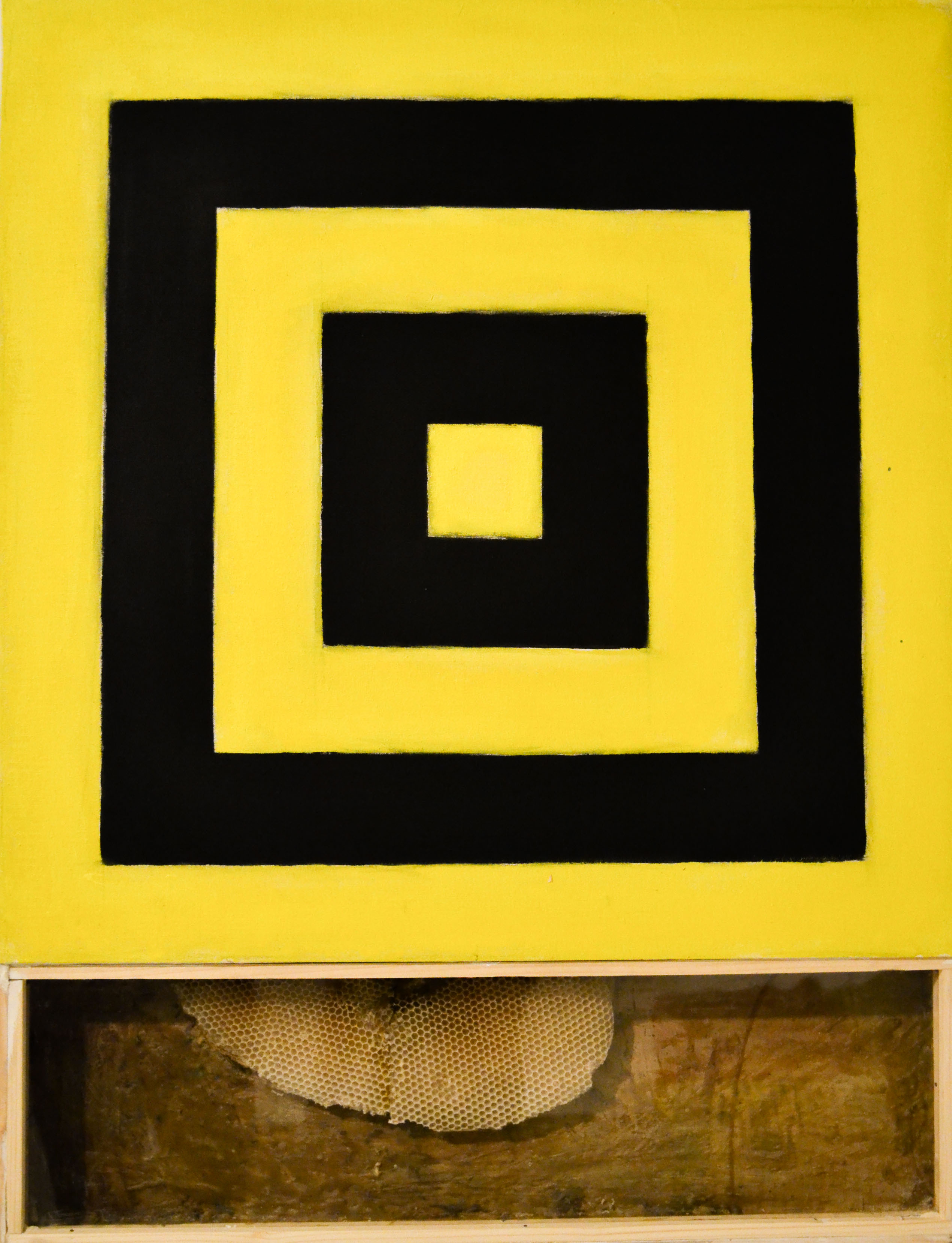 Piotr Lutyński